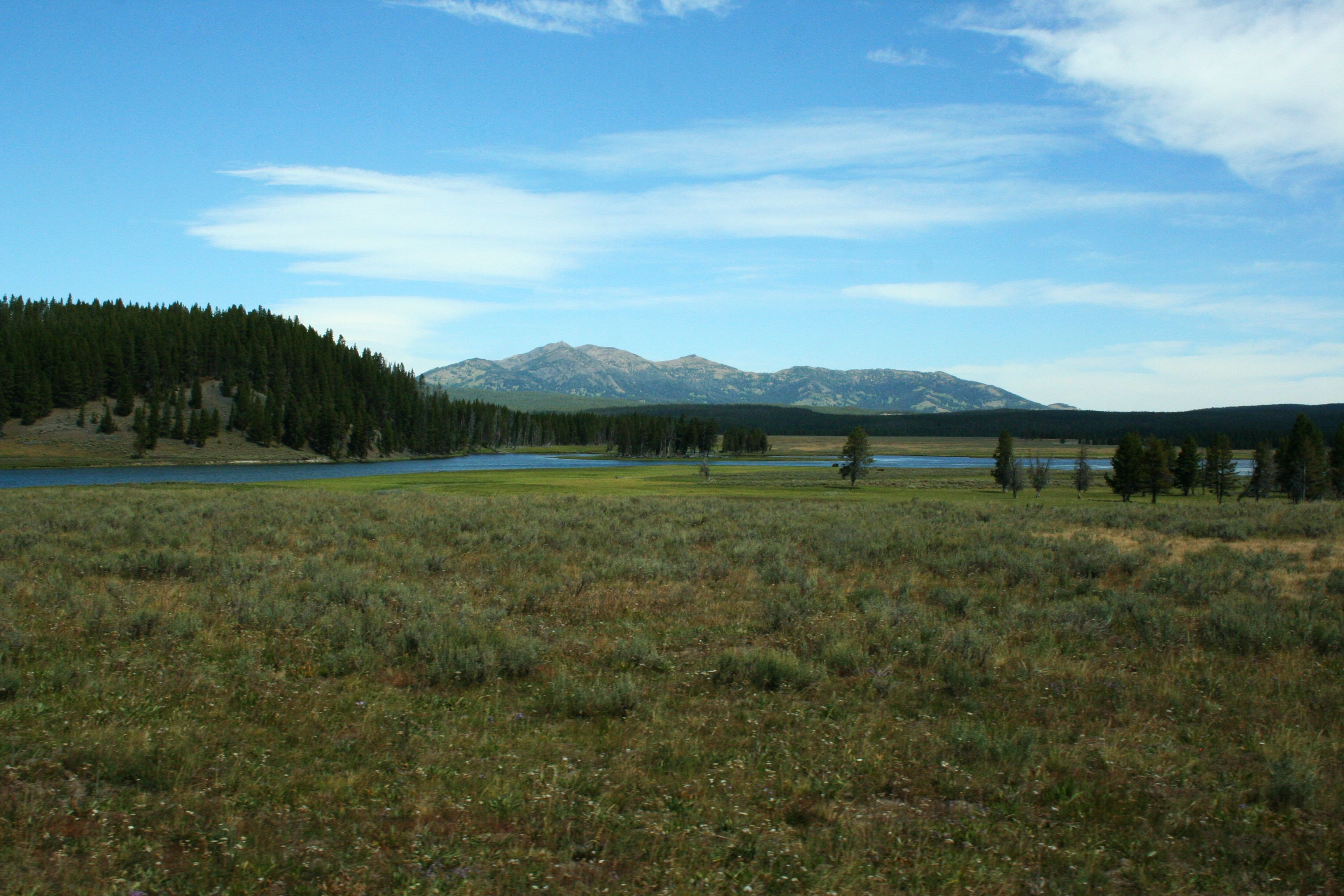 Dolina Haden - północna część doliny